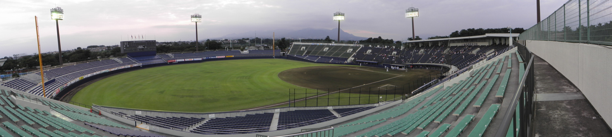 上毛新聞敷島球場（群馬県前橋市）